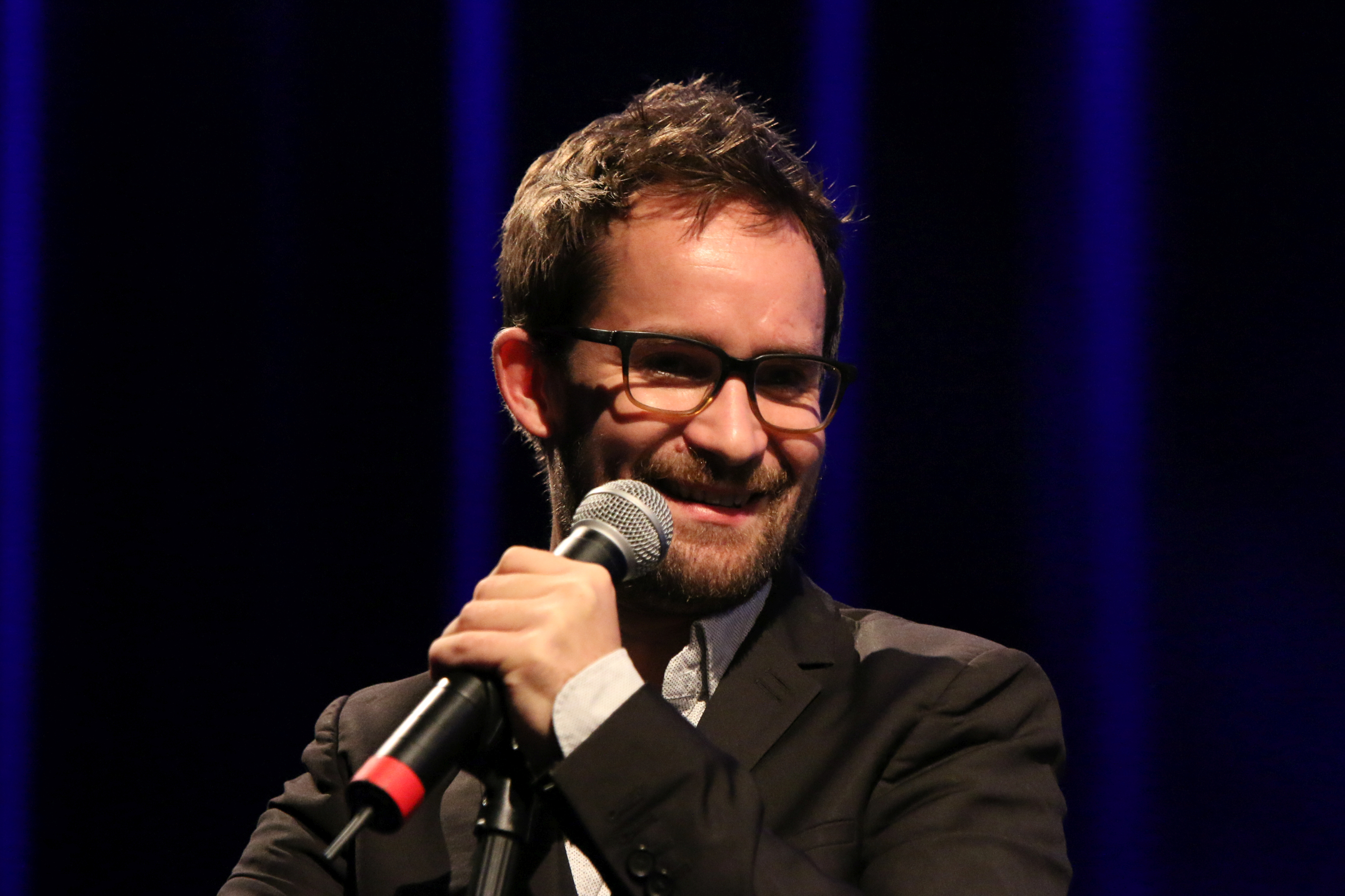 46. Deutsches Jazzfestival Frankfurt 2015: Duo Belle Epoque: Émile Parisien